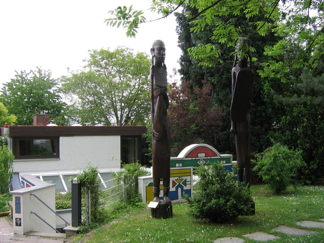 Afrikahaus, Freiberg am Neckar, Württemberg, Germany